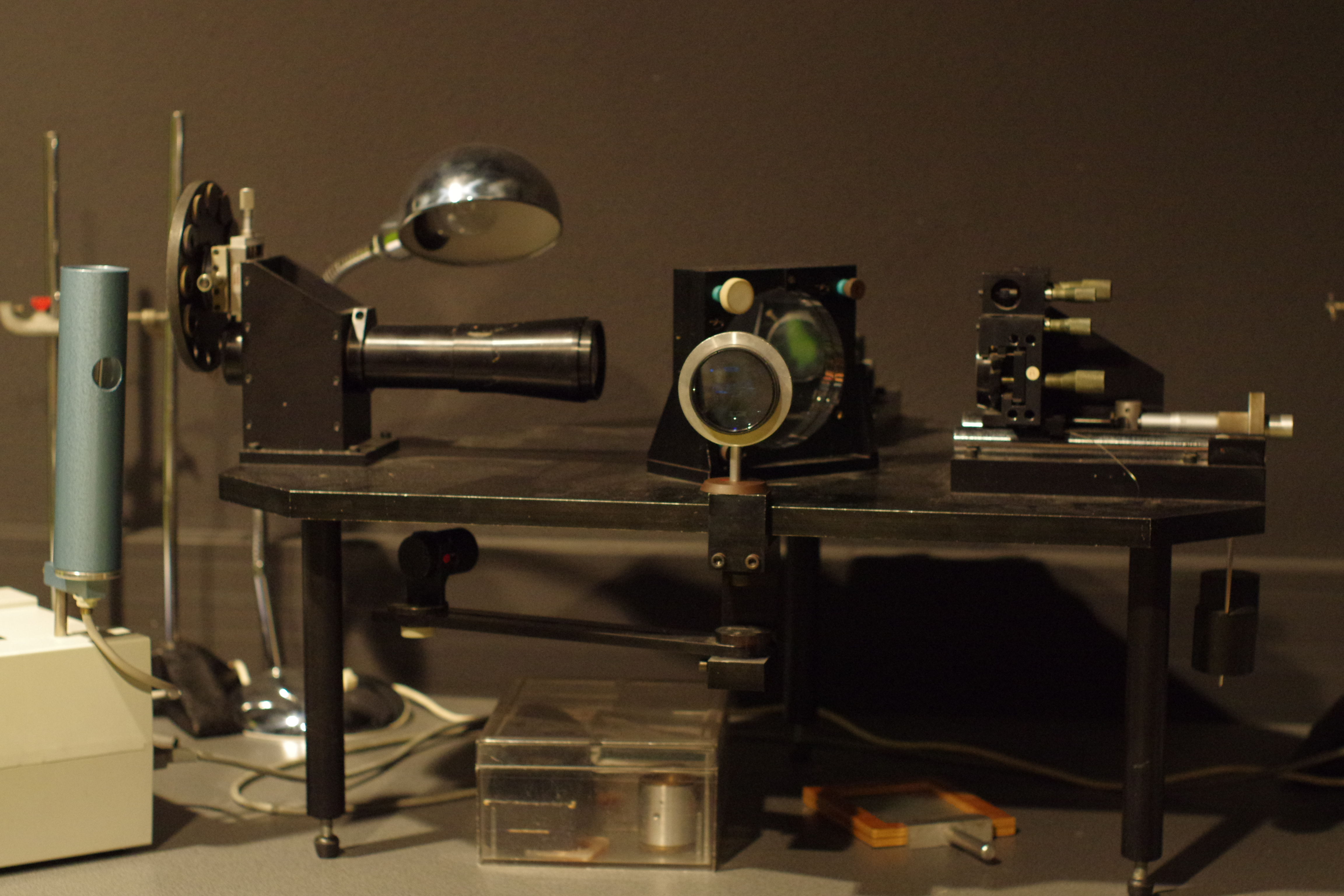 Exemple d'interféromètre de Michelson, photographie prise à SupOptique